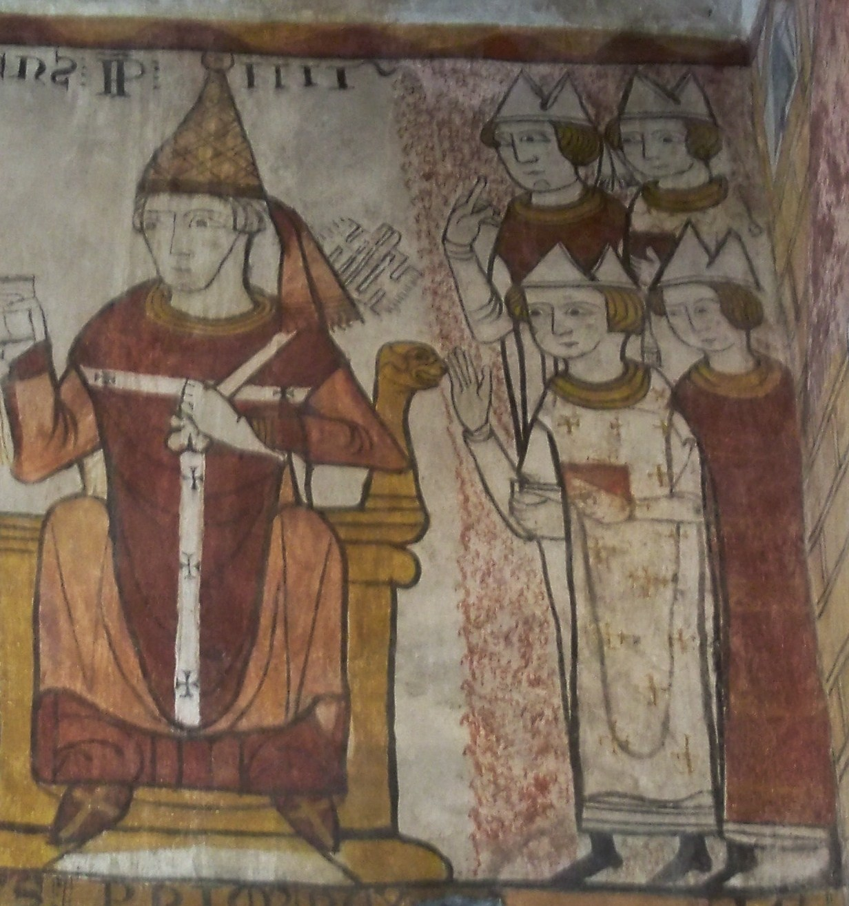 Pape Clément IV (Fresque de la Tour Ferrande à Pernesles Fontaine, Vaucluse, France)